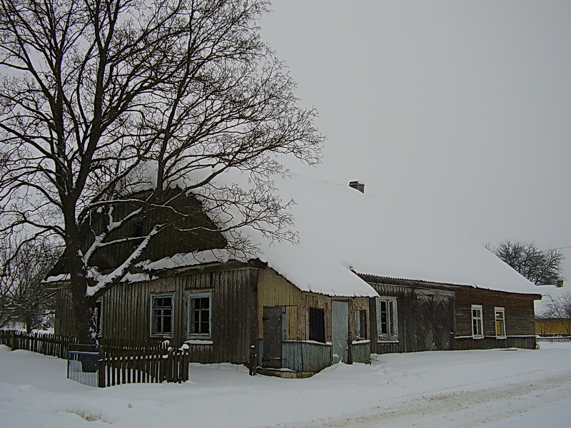 Нача. Карчма